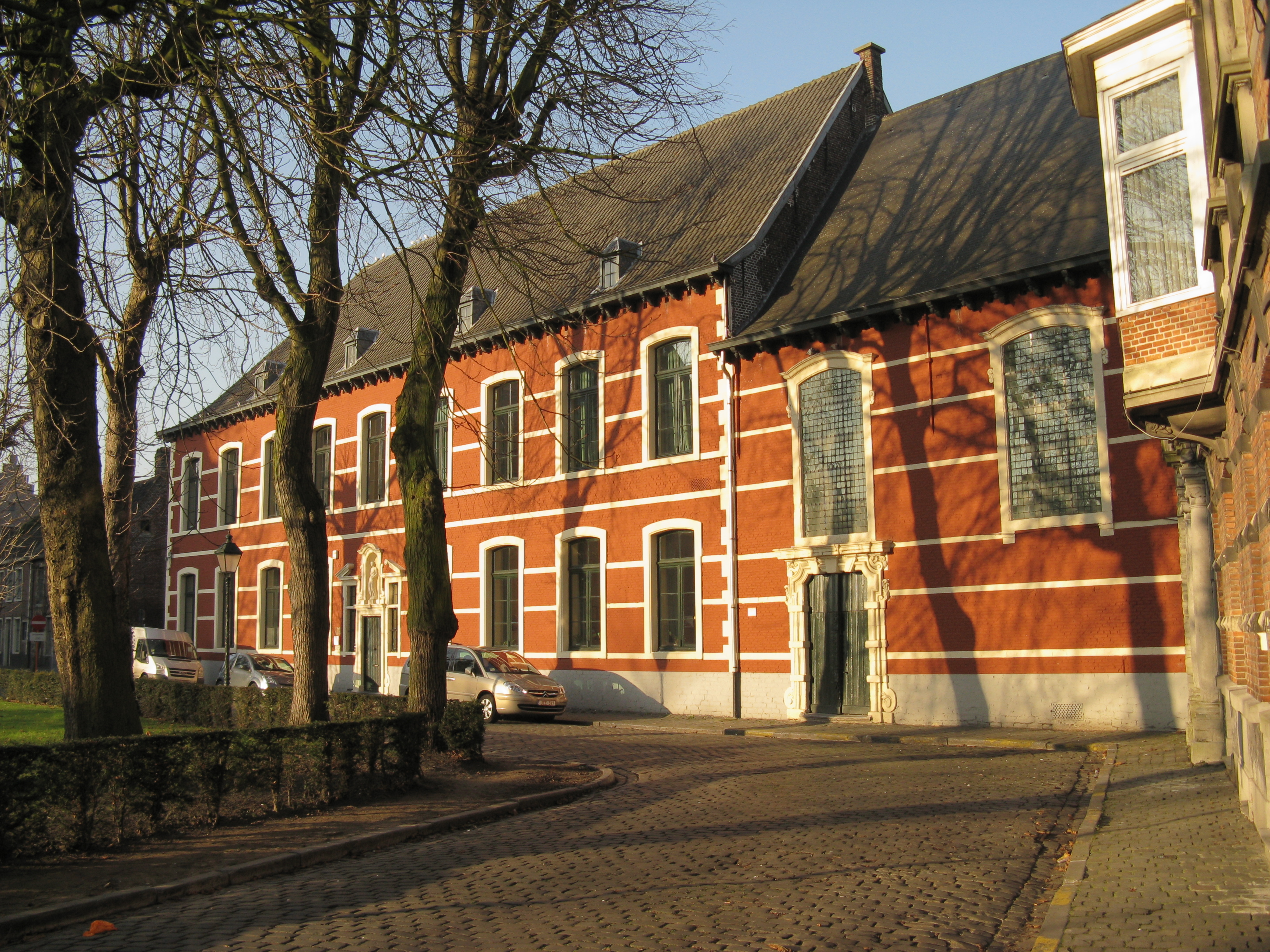 Gent, Sint-Elisabethbegijnhof, voormalig Groothuis en Infirmerie van het begijnhof, tegenwoordig basisschool De Muze. Op zaterdag de vergaderplaats van scoutsgroep 120° FOS "De Zwaluw".